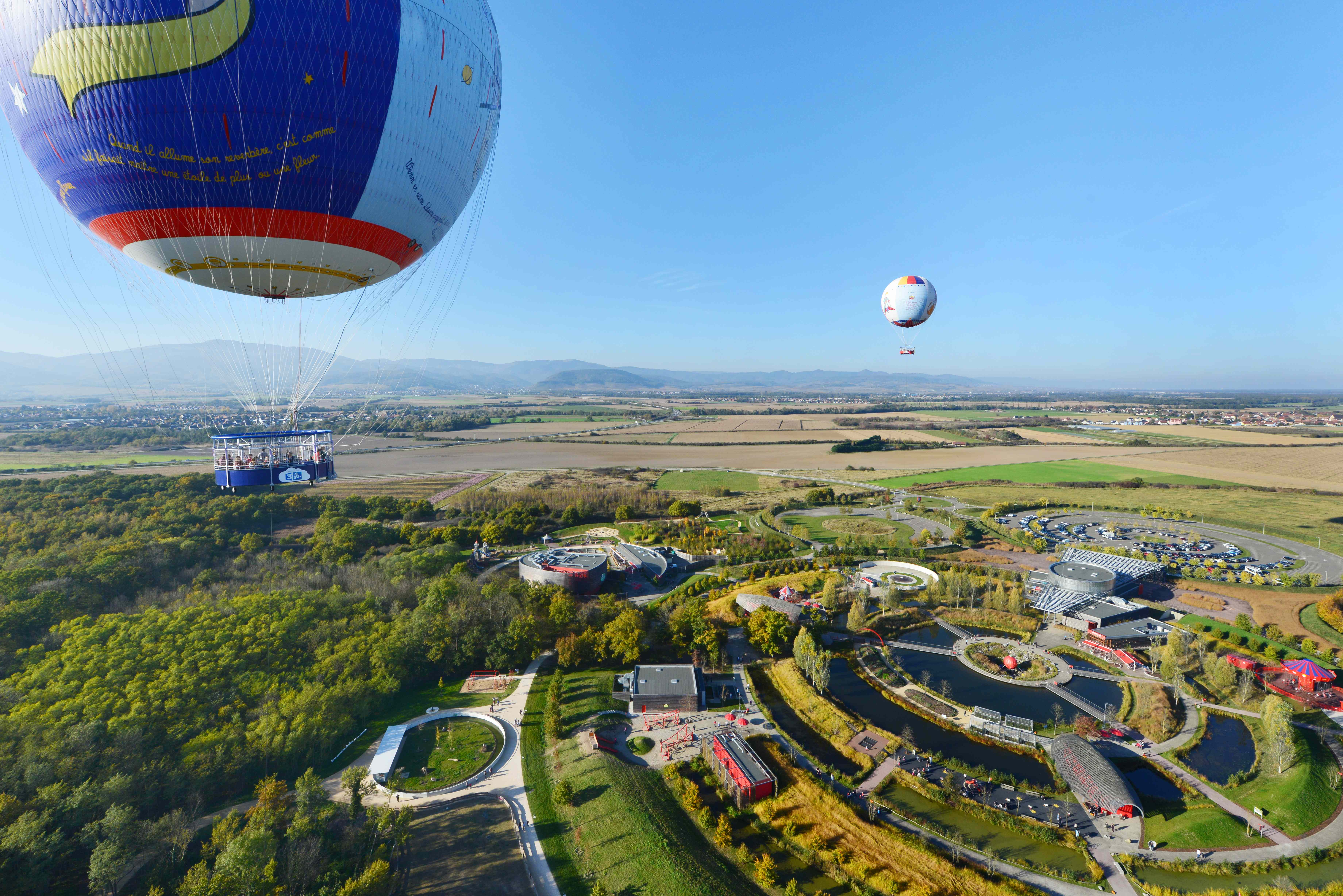 Les ballons captifs du Parc du Petit Prince